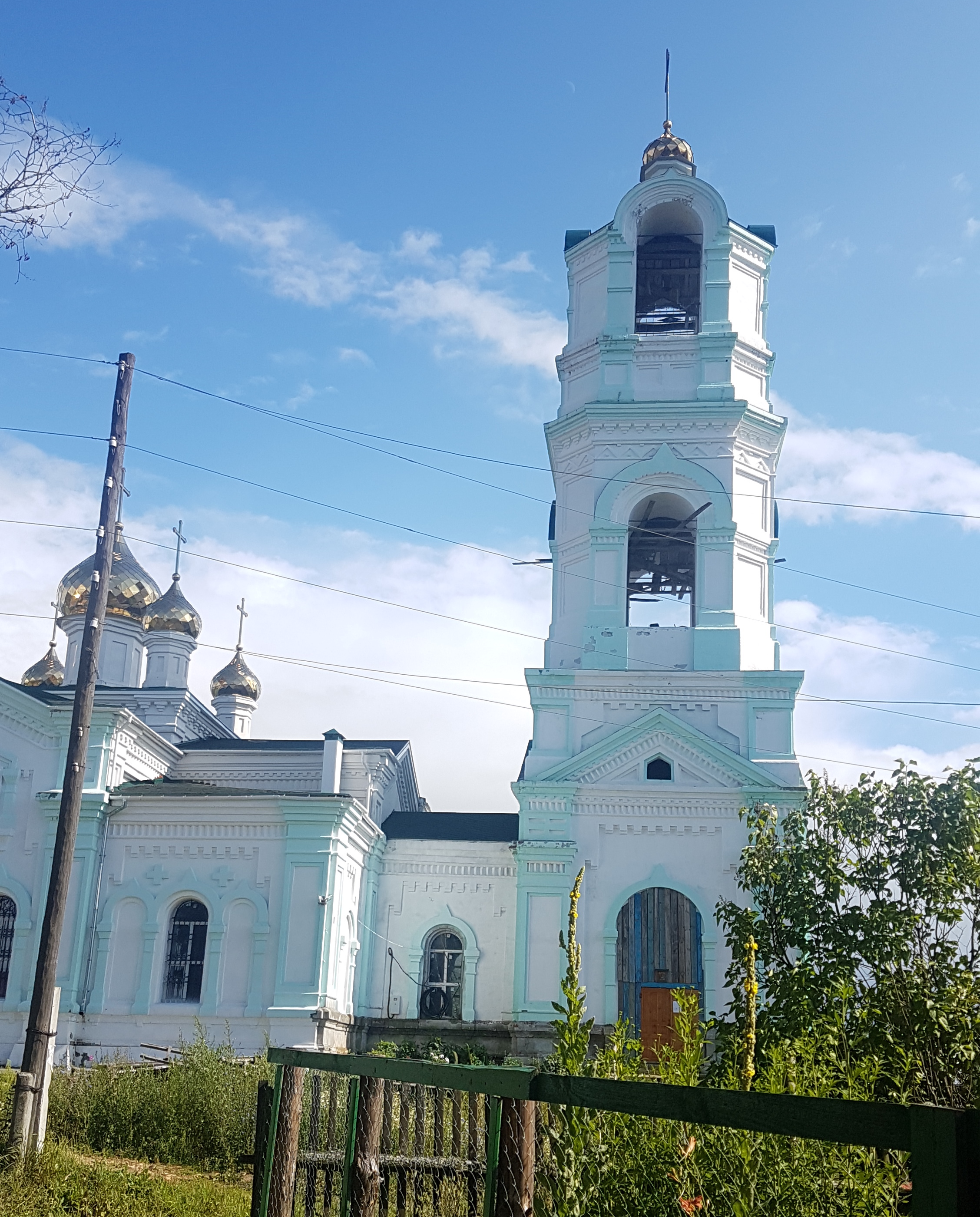 село Польцо Нижегородской области